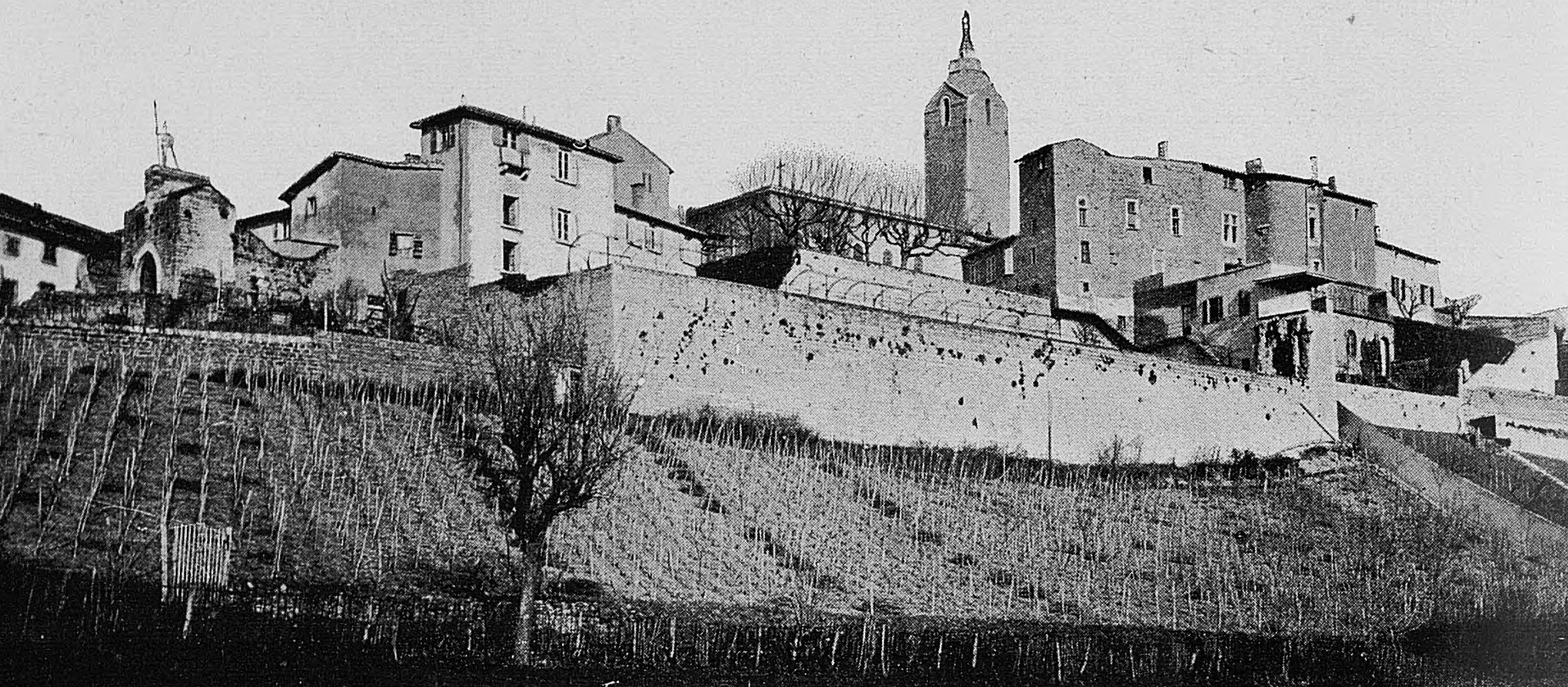 Dictionnaire illustré des communes du département du Rhône. Tome 1 / par MM. E. de Rolland et D. Clouzet.